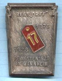 17. Bayerisches Infanterie-Regiment (Germersheim), Abzeichen des Regimentsvereins zum 50-jährigen Gründungsjubiläum des Regiments und zur Wiedersehensfeier 1928